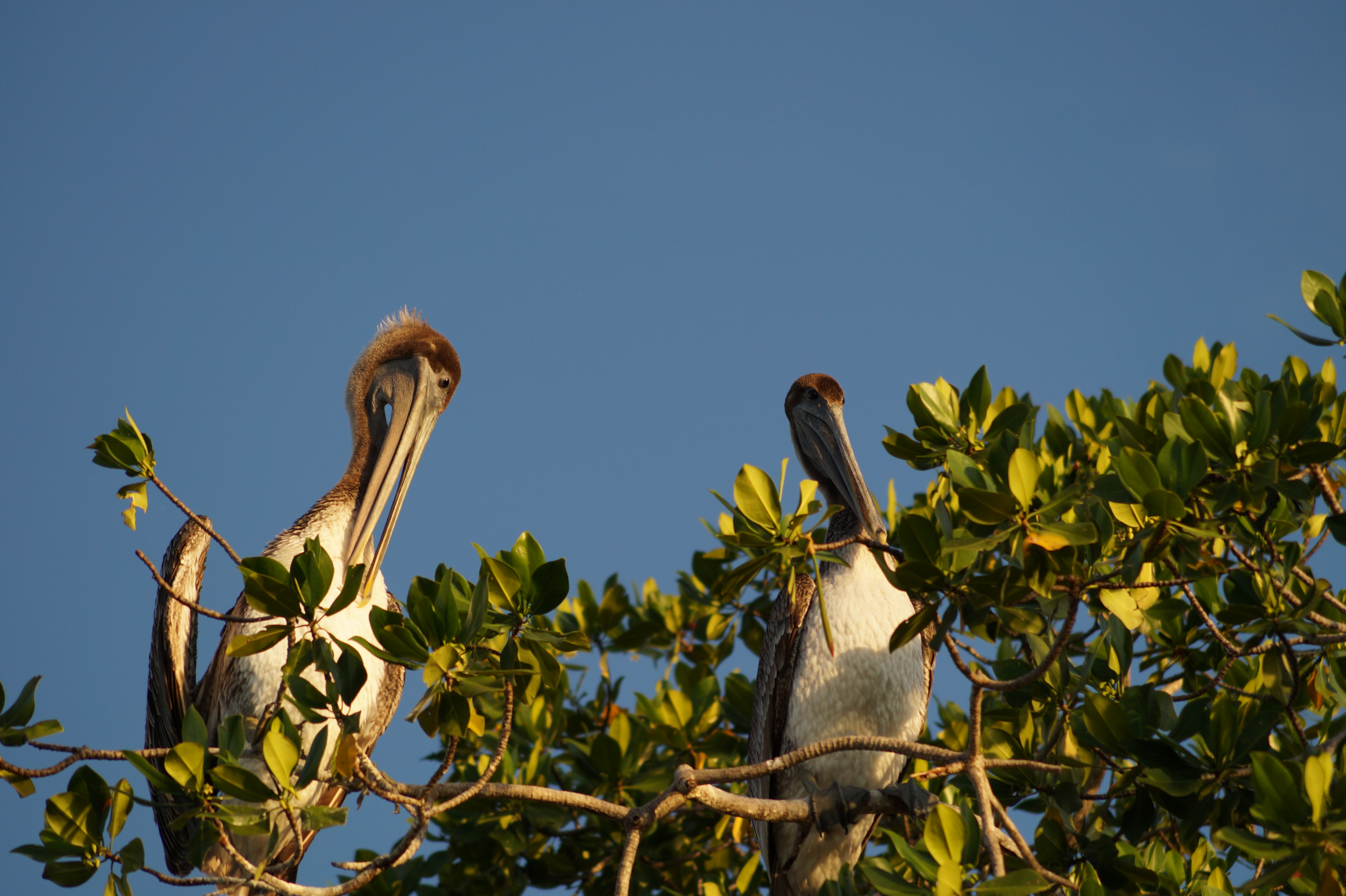 Pelicanos en la laguna de Manialtepec